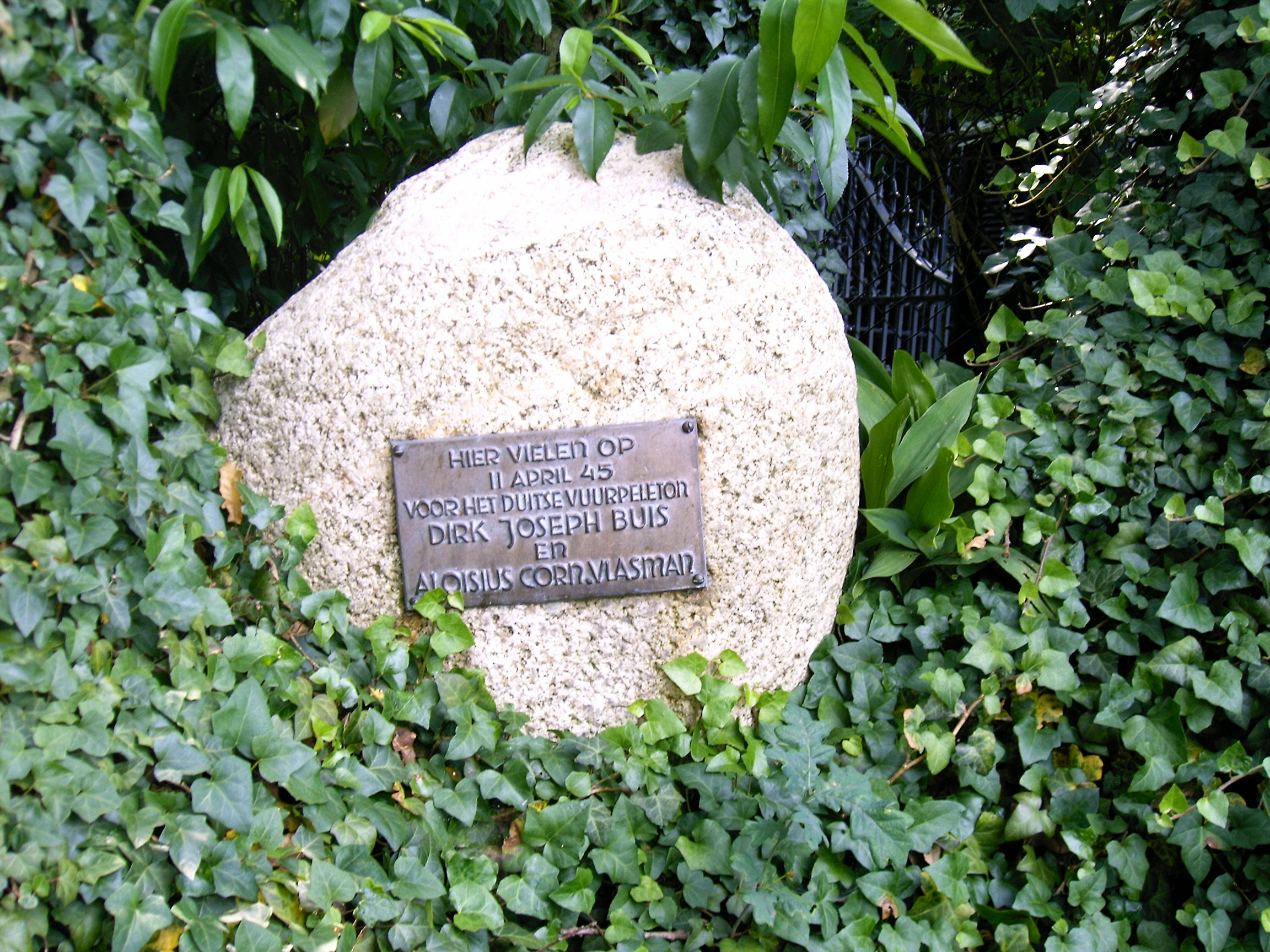 Monument voor de gevallenen in Laren